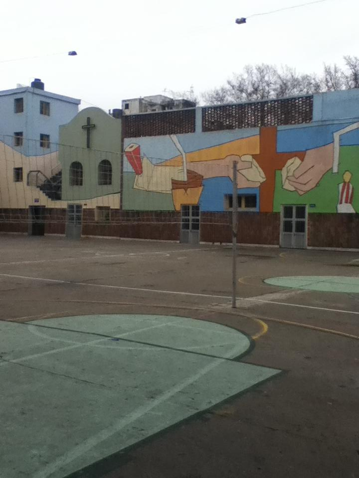 Patio que corresponde al Instituto Preuniversitario Salesiano Juan XXIII.